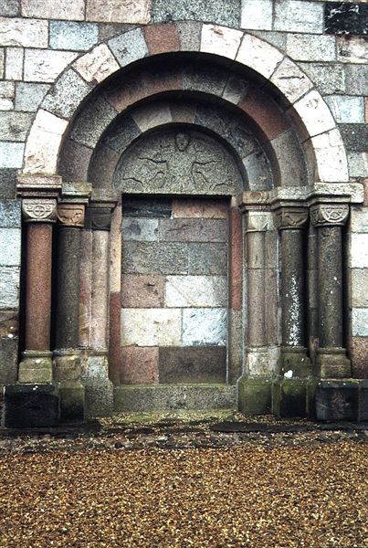 Vinderslev Kirke, Silkeborg Kommune, nordportal